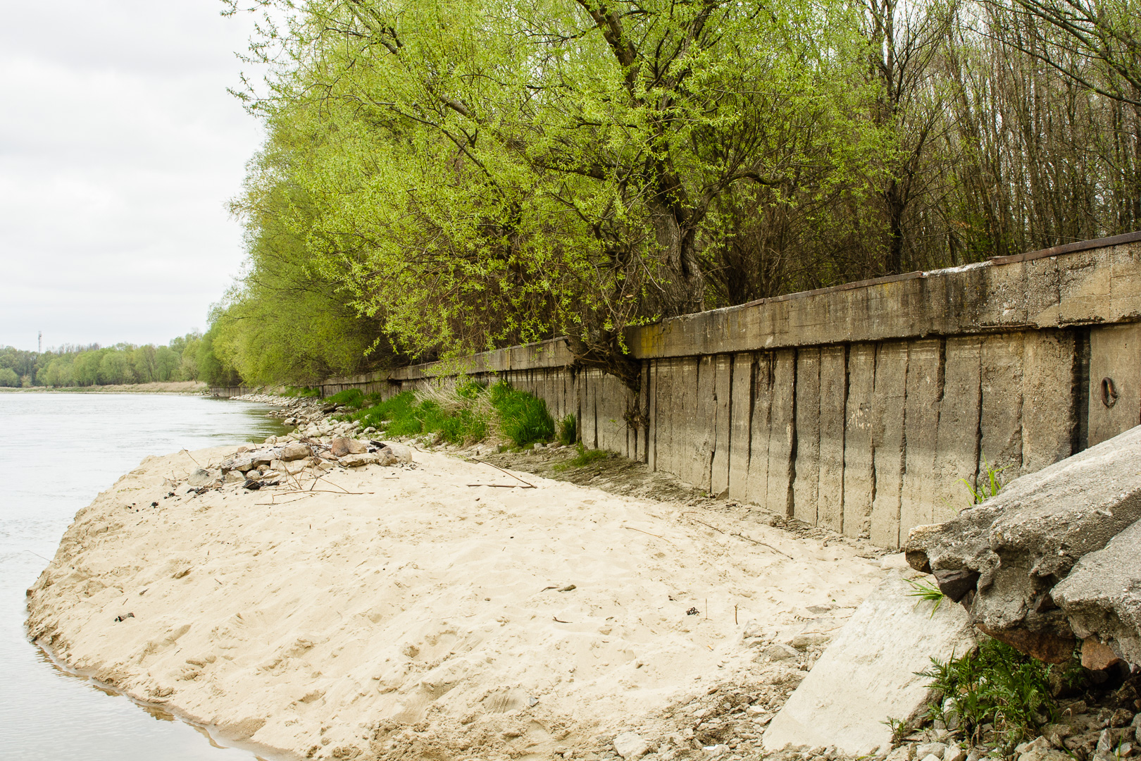 Opaska brzegowa wzdłuż części Kępy Wieloryb nad Wisłą w Warszawie. This is a photography of Natura 2000 protected area with ID PLB140004